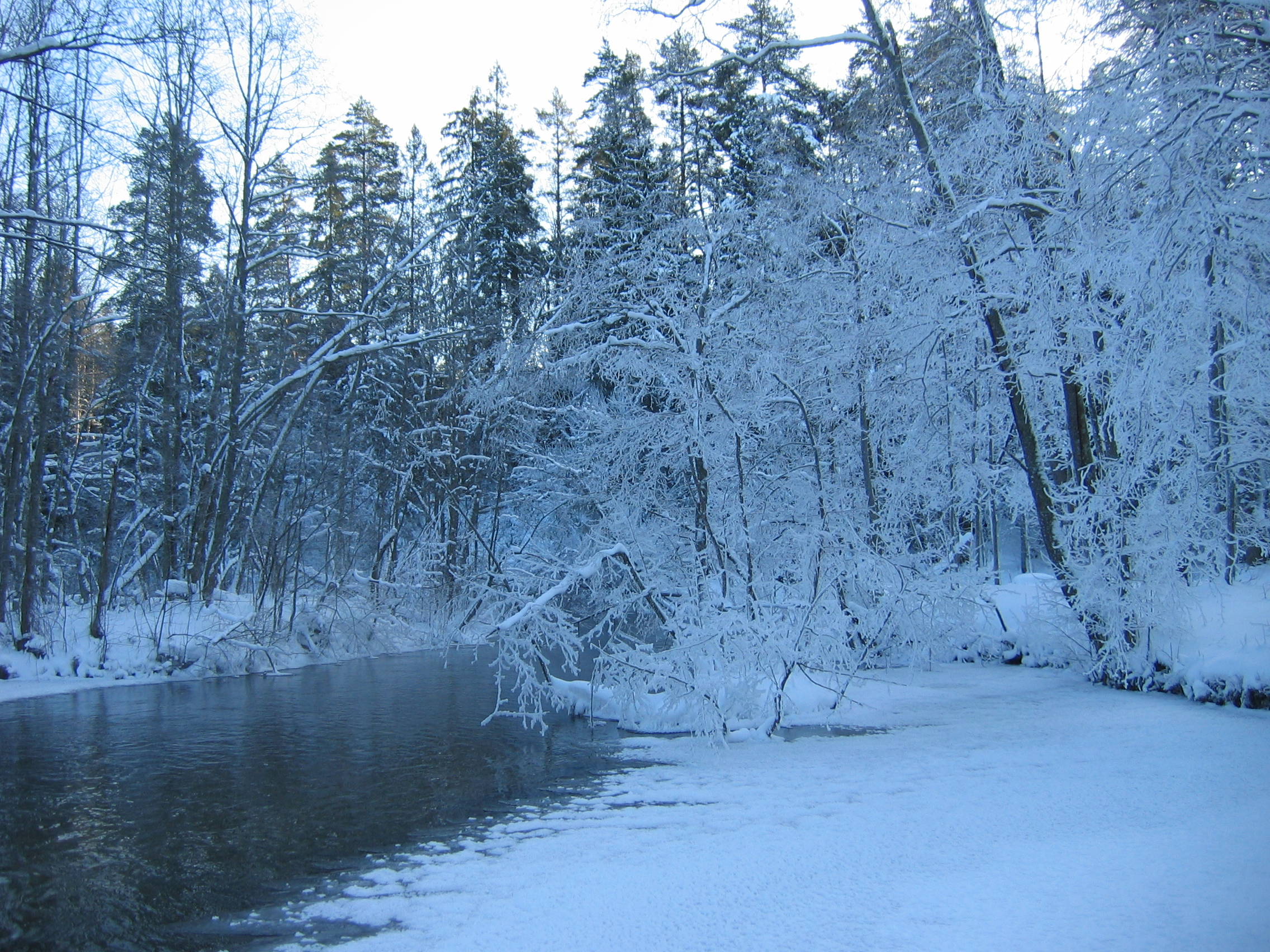 Река Валдайка, январь 2012.